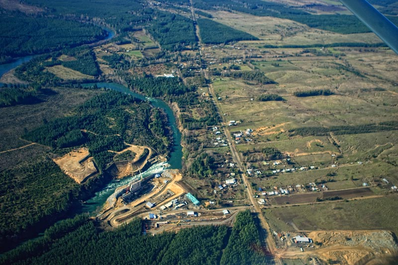 Vista aérea CH Laja